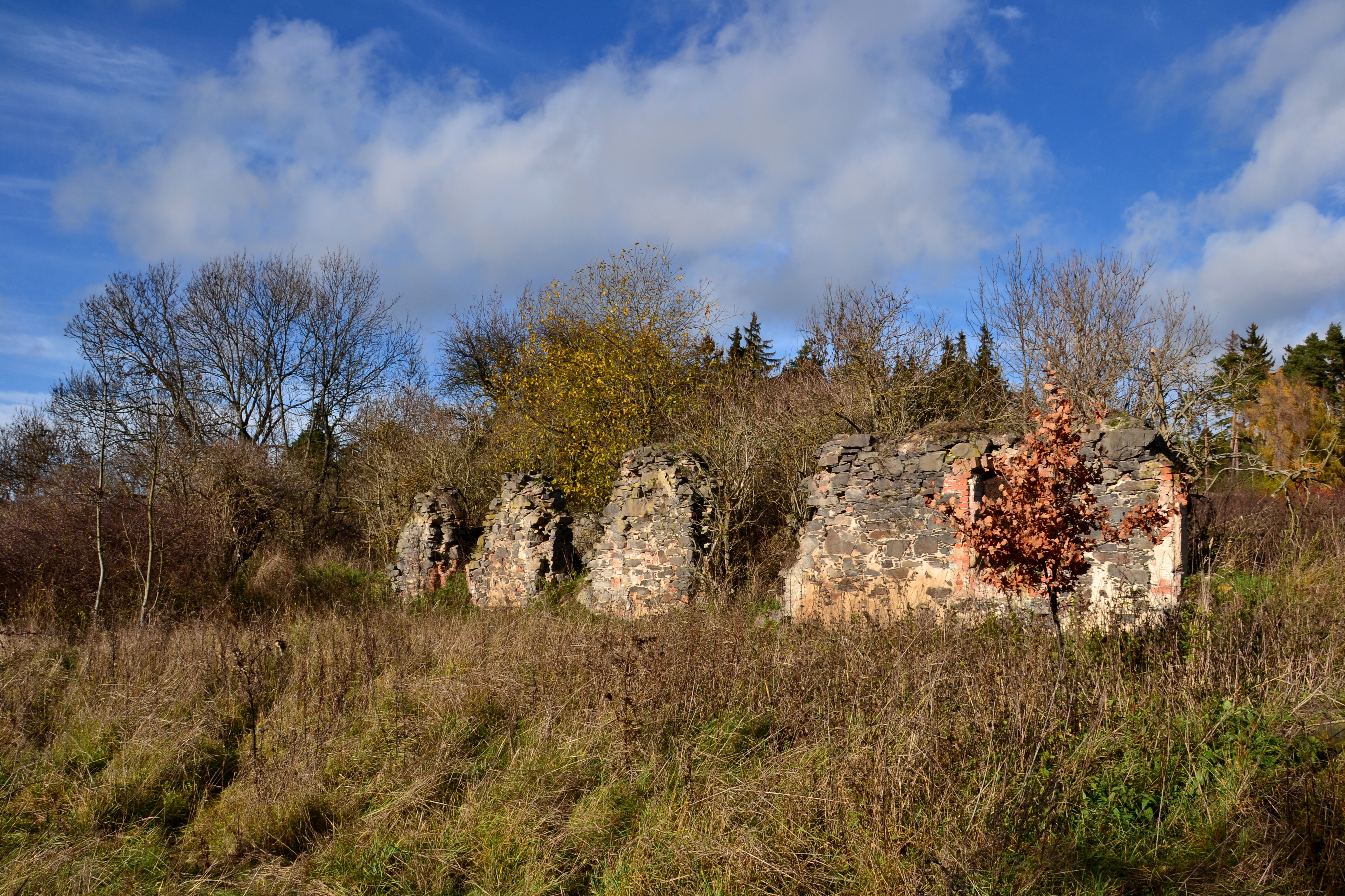 Zřícenina domu v bývalém hospodářském dvoře